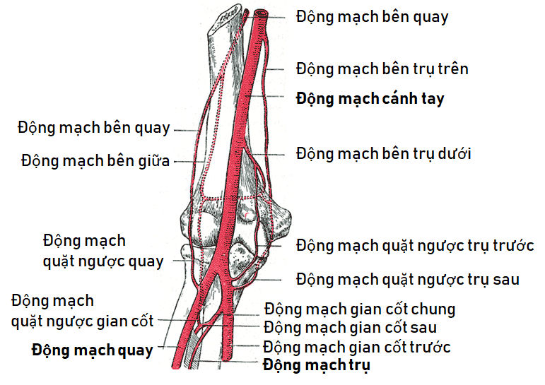 Chi trên bên phải, nhìn trước: động mạch cánh tay và khuỷu tay. Bản dịch Tiếng Việt của File:Gray526.png